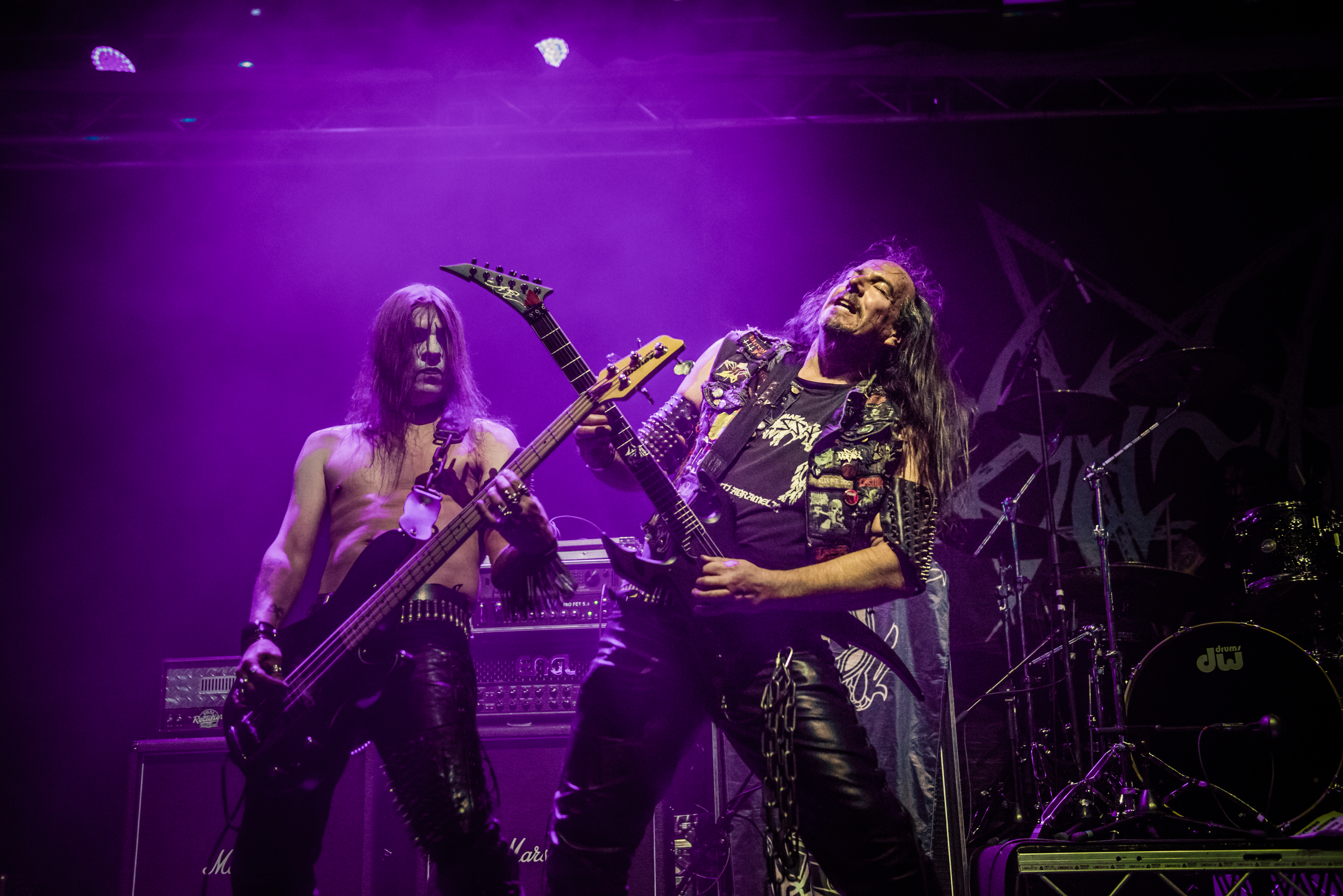 'Ruhrpott Metal Meeting 2016; Oberhausen Turbinenhalle': 'Desaster'